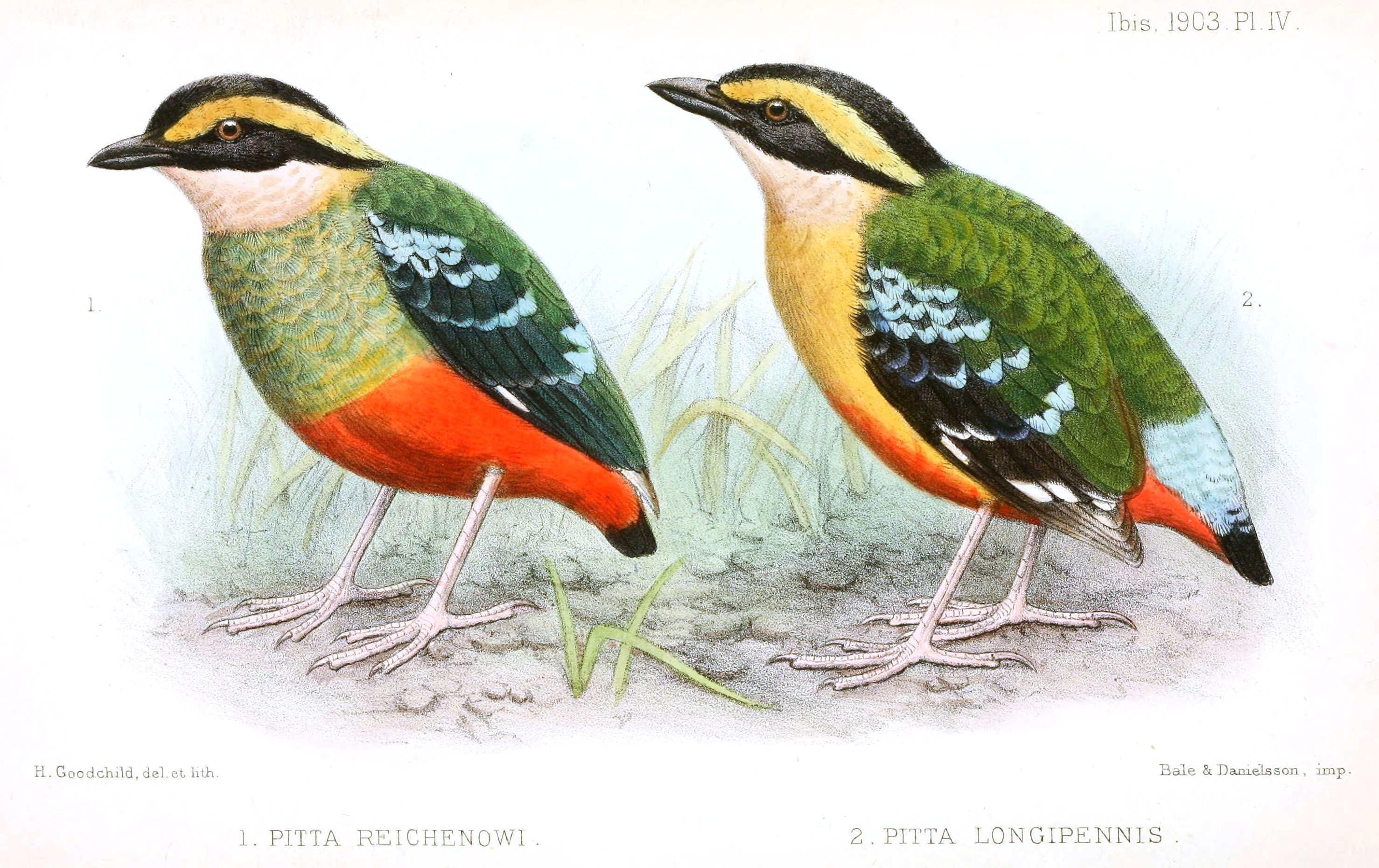 Pitta reichenowi & Pitta longipennis (=Pitta angolensis longipennis)